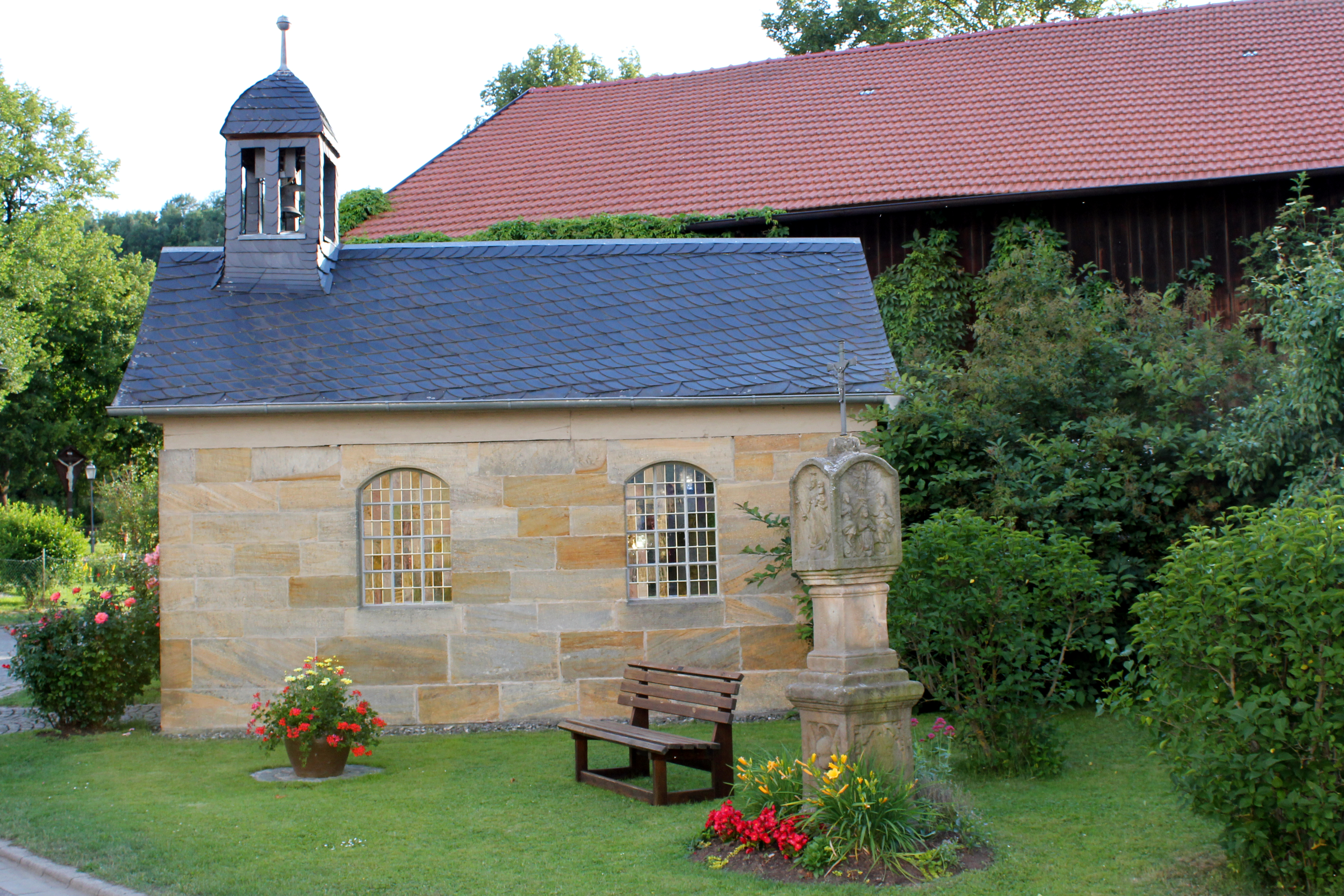 Die Katholische Kapelle in Tauschendorf; davor Sandsteinmarter von 1805